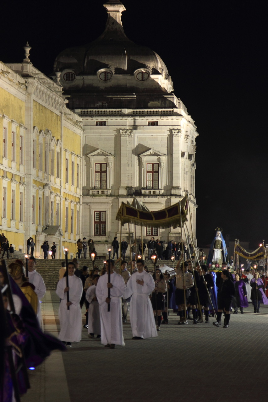 Procissão do Enterro em Sexta-Feira Santa, Mafra (de Sérgio Medeiros)